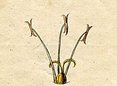 Ausschnitt (Klasse III) aus Ehrets Tafel "Methodus Plantarum Sexualis"